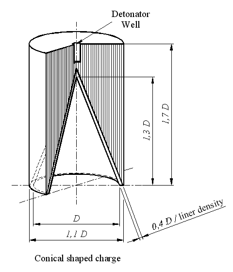 Conical Shaped Charge